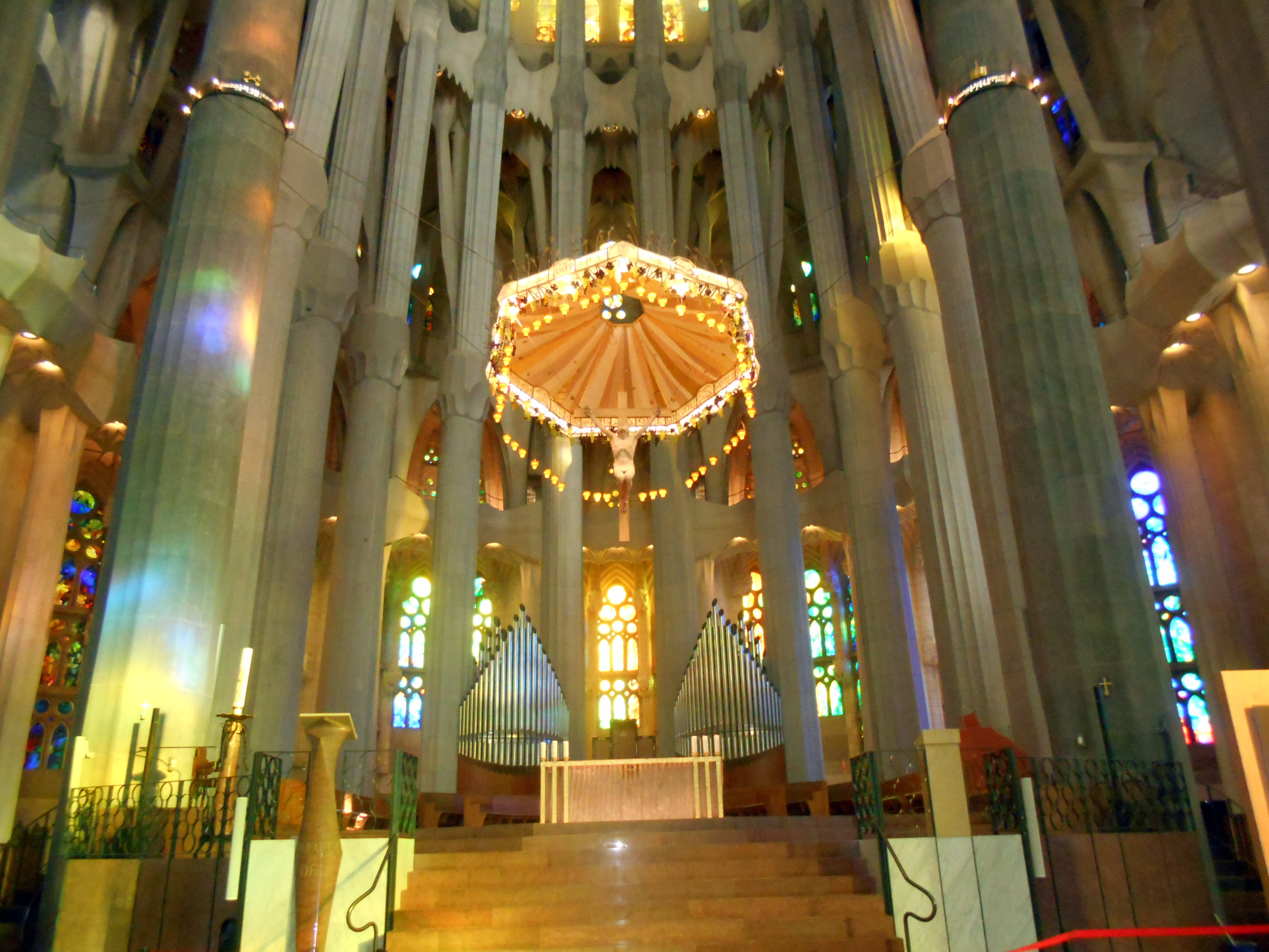 Altar de la Sagrada Familia.